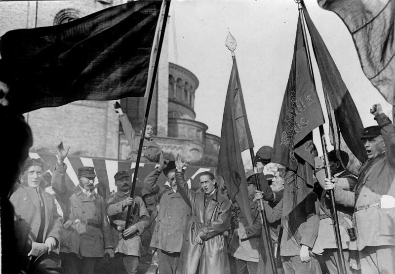 Die grosse Kundgebung des Reichsbanners Schwarz-Rot-Gold fand unter Beteiligung Zehntausender am 26. Oktober in Potsdam statt. Das Hoch auf das Reichsbanner Schwarz-Rot-Gold während der Bannerweihe auf dem Bassinplatz in Potsdam.